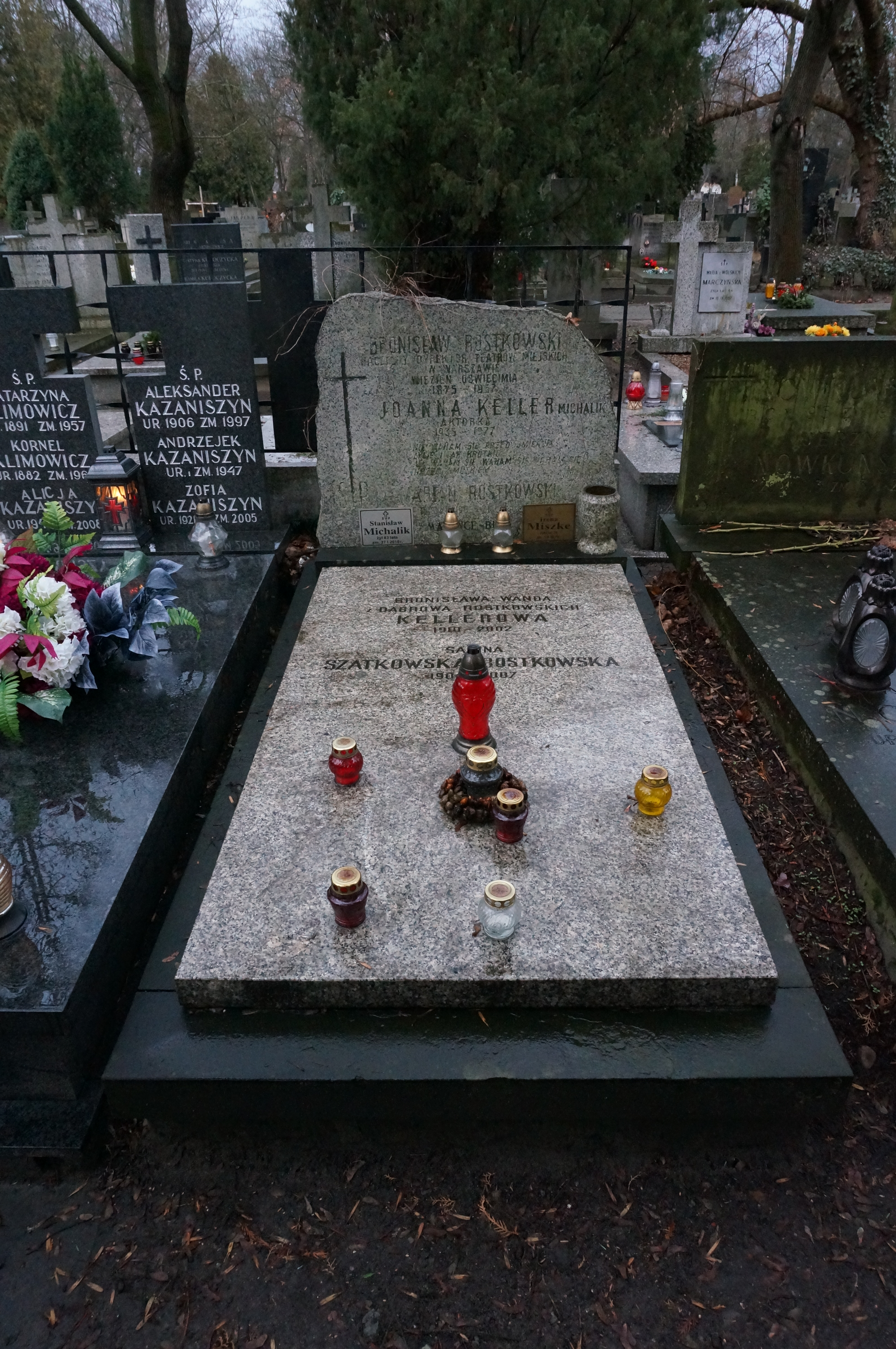 Grób Stanisława Michalika na Cmentarzu Powązkowskim (kwatera 101, rząd 3, grób 24)